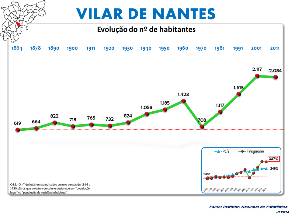 Evolução da População 1864 / 2011